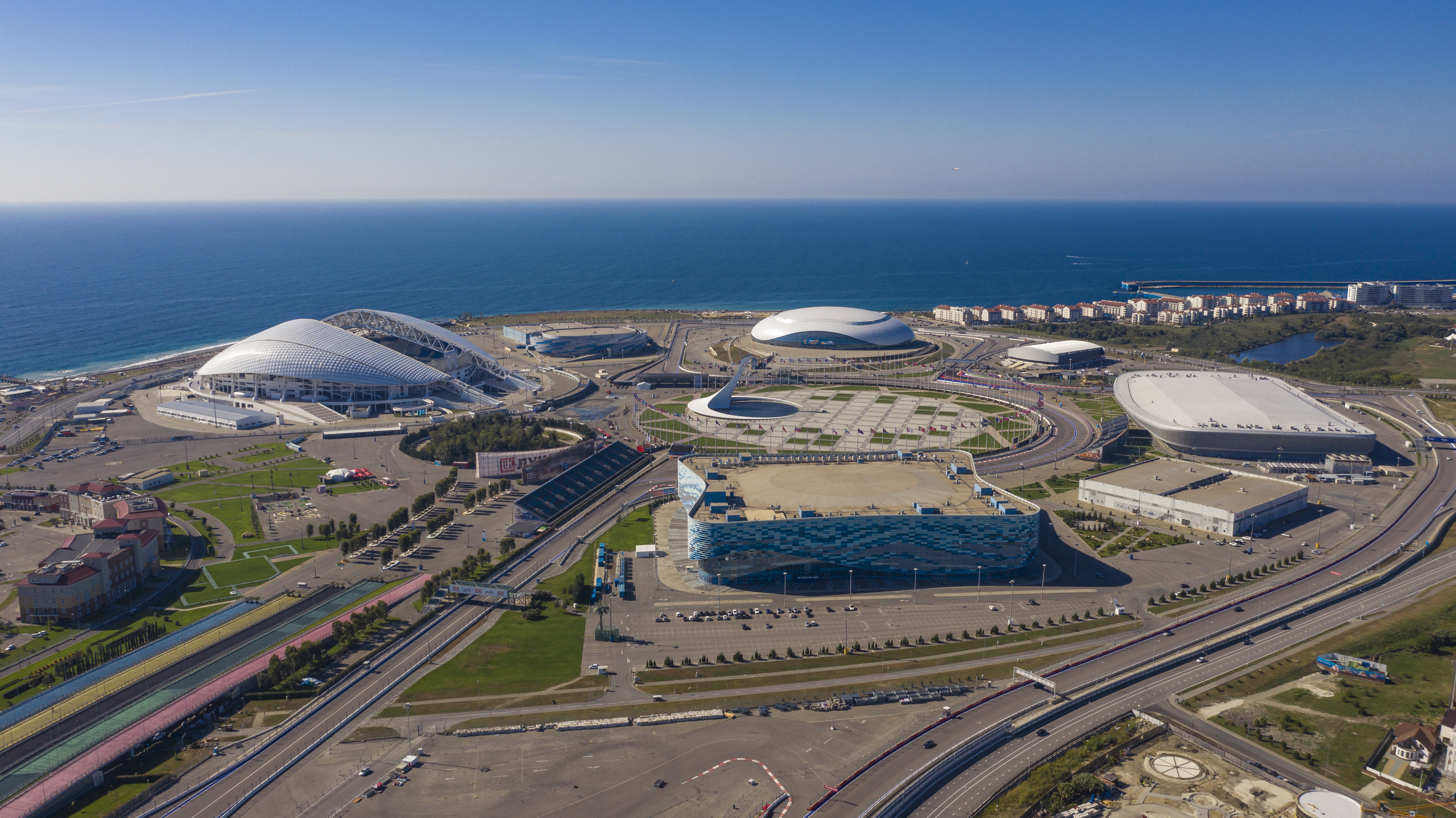 Blick auf den Olympiapark Adler (Sotschi)